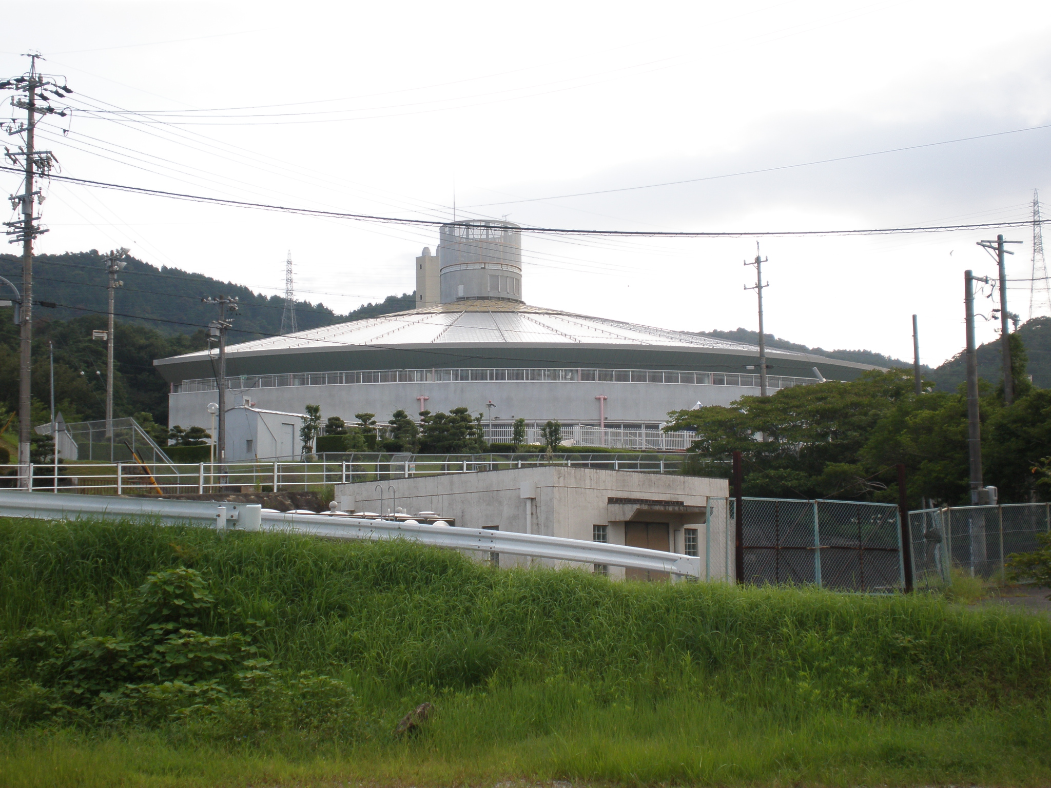 愛知県小牧市にある小牧市温水プール